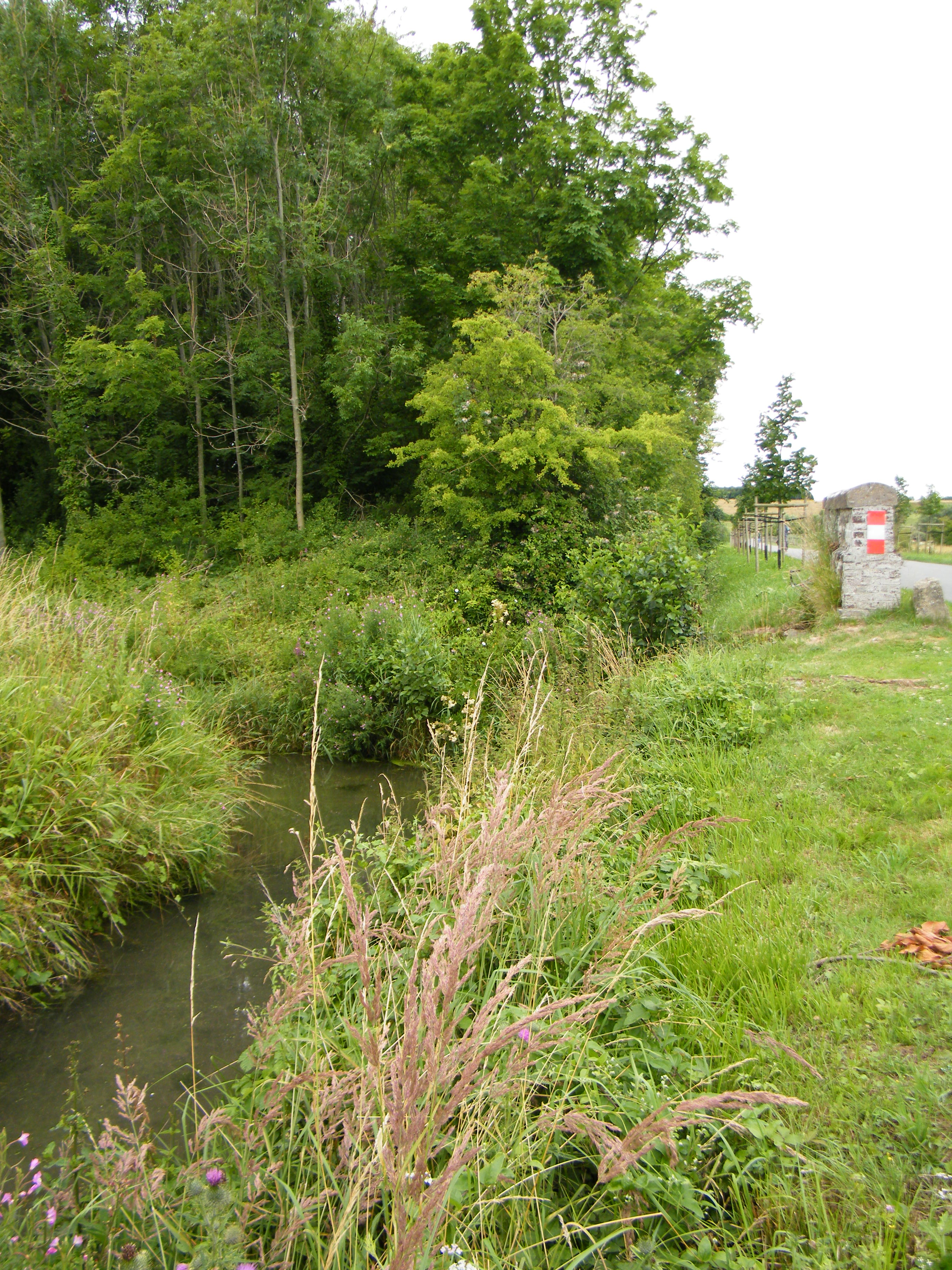 La Drancourt rejoint l'Amboise, Neuville-Ribeauville, Estréboeuf, Somme, France